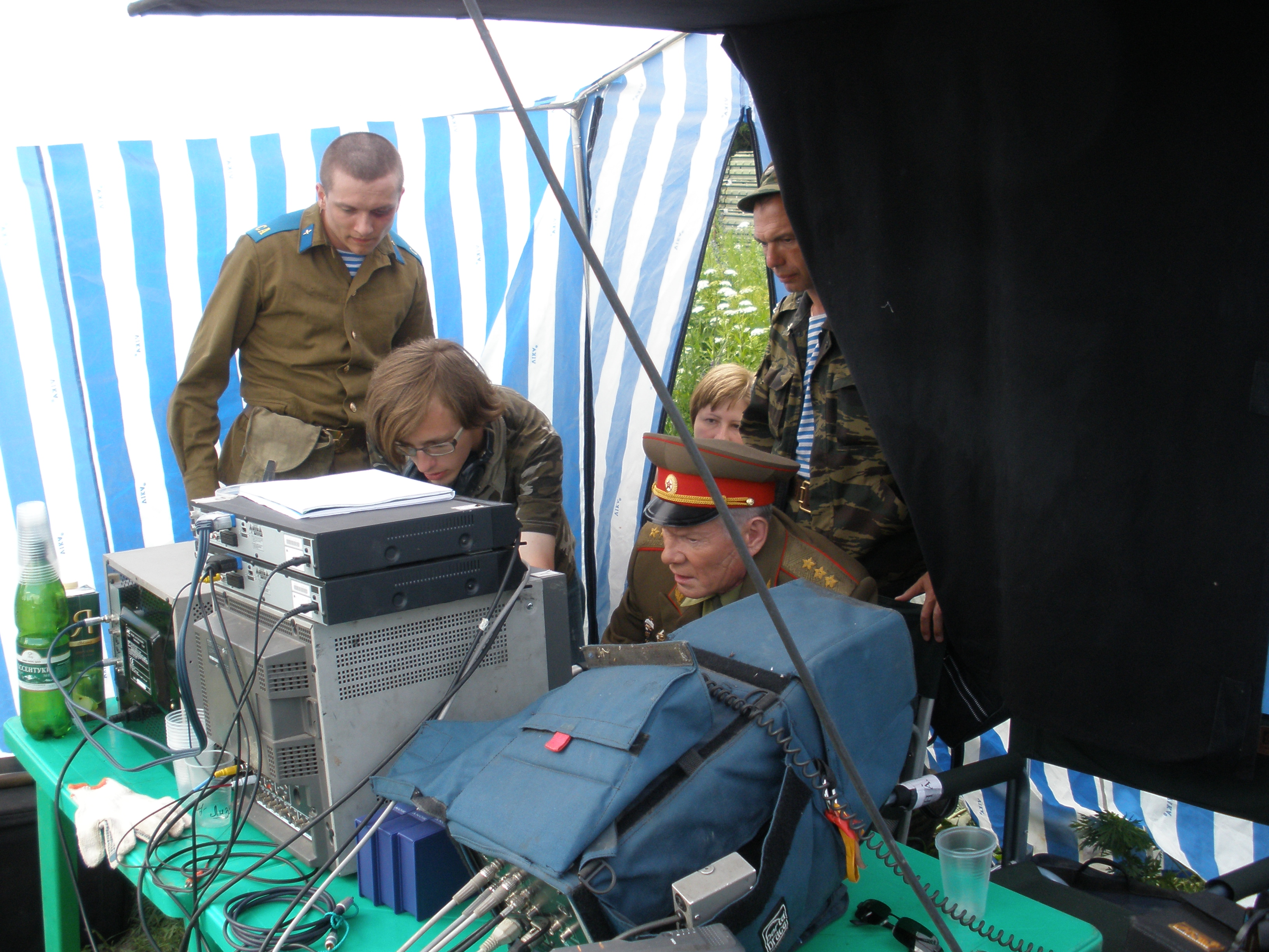 Съёмки сериала "Десантный батя"